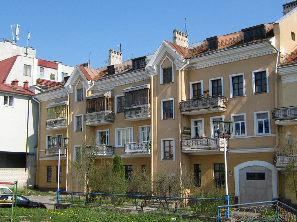 Магілёў. Вуліца Ленінская, 10 (двор)